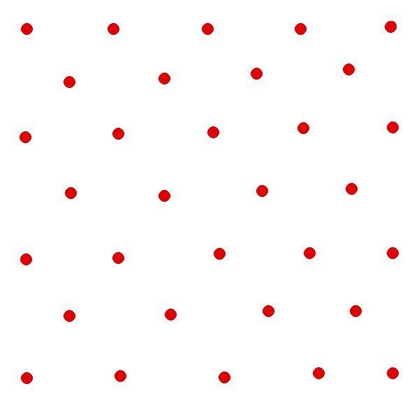 Interprètation graphique d'une œuvre de Niele Toroni auteur "Siren" (d'après un tableau de Niele Toroni) Siren - (discuter) 27 mai 2006 à 20:49 (CEST)